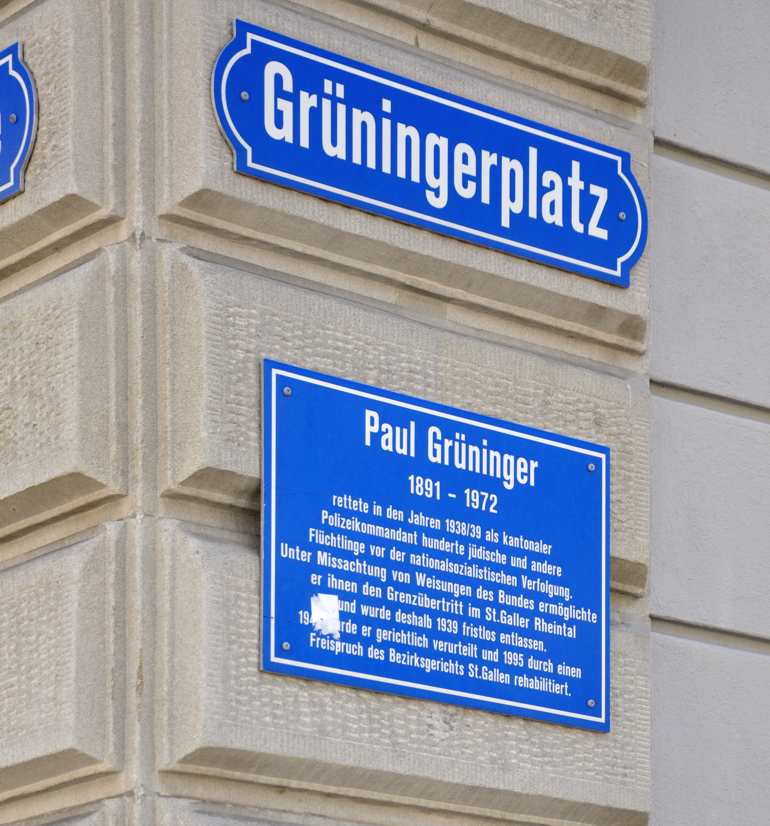 St. Gallen SG, Straßenschild "Grüningerplatz" mit Erläuterungstafel zu Paul Grüninger